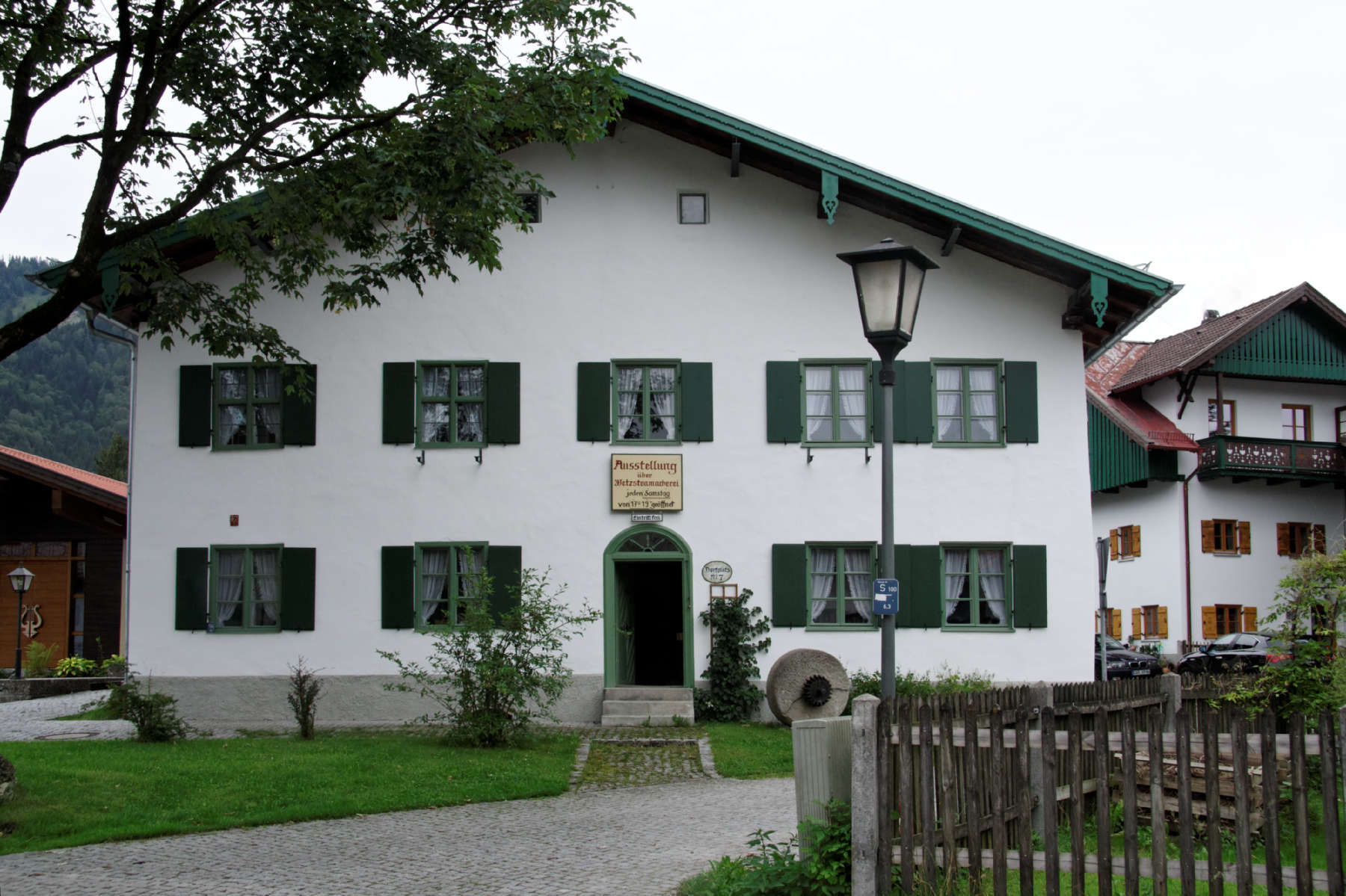 Unterammergau, ehemaliges Forsthaus (heute Wetzsteinmuseum) mit Musikpavillon am Dorfplatz 7